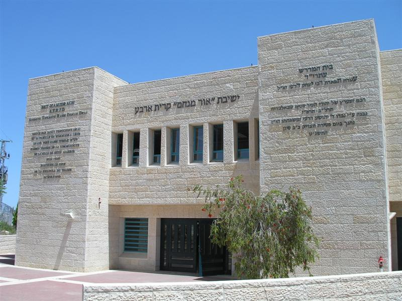 החזית הקדמית של ישיבת "אור מנחם" בקריית ארבע.